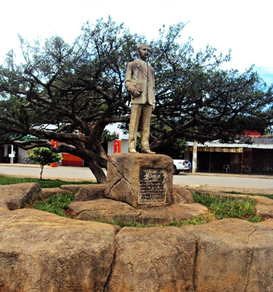 Fotografia do monumento em homenagem ao Sr. José Monteiro Lima na praça central de Padre Bernardo - Goiás. Contribuição para acervo estudantil e cultural do município.